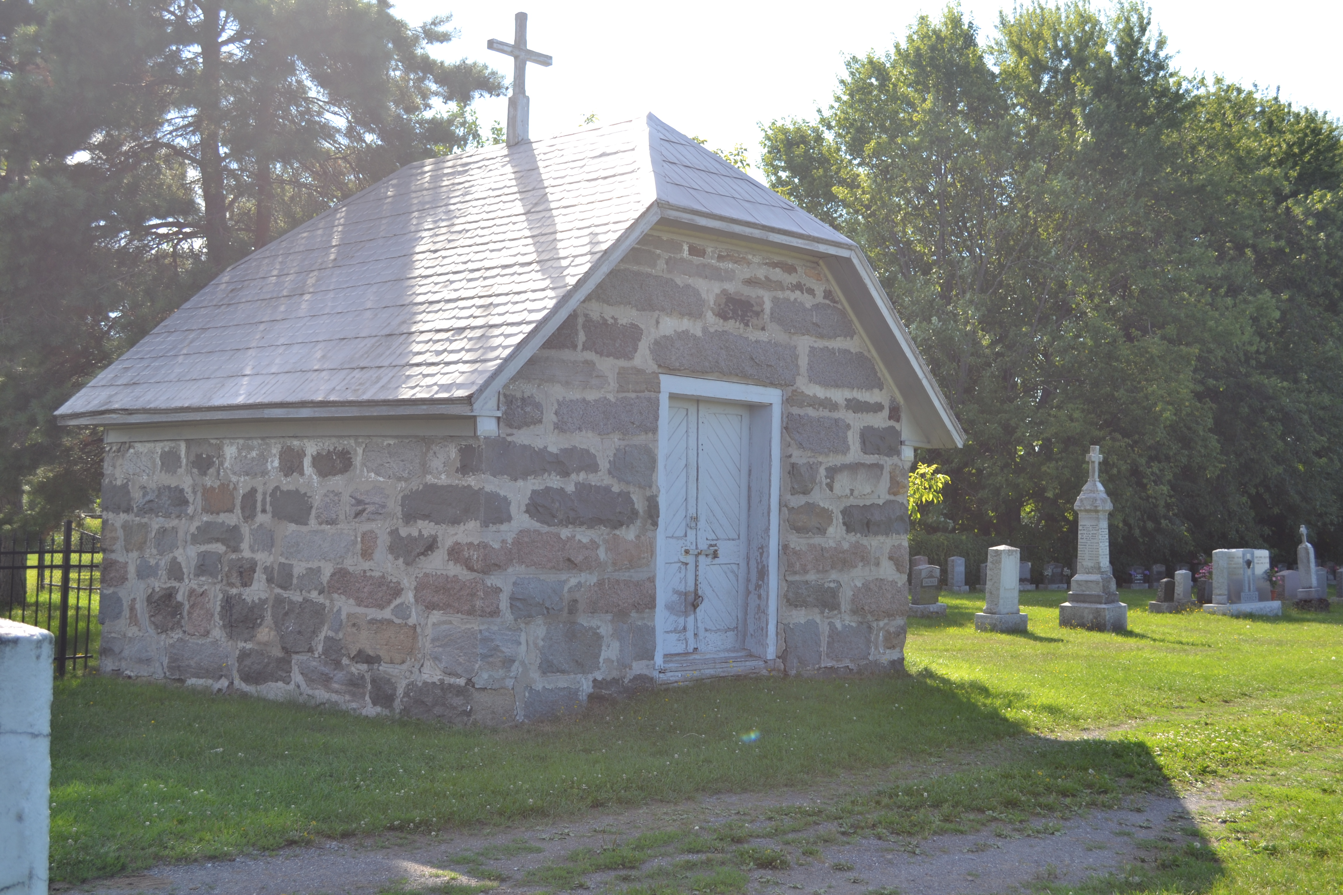 Charnier de l'église Saint-Cyrille à Saint-Cyrille-de-Wendover, Québec.